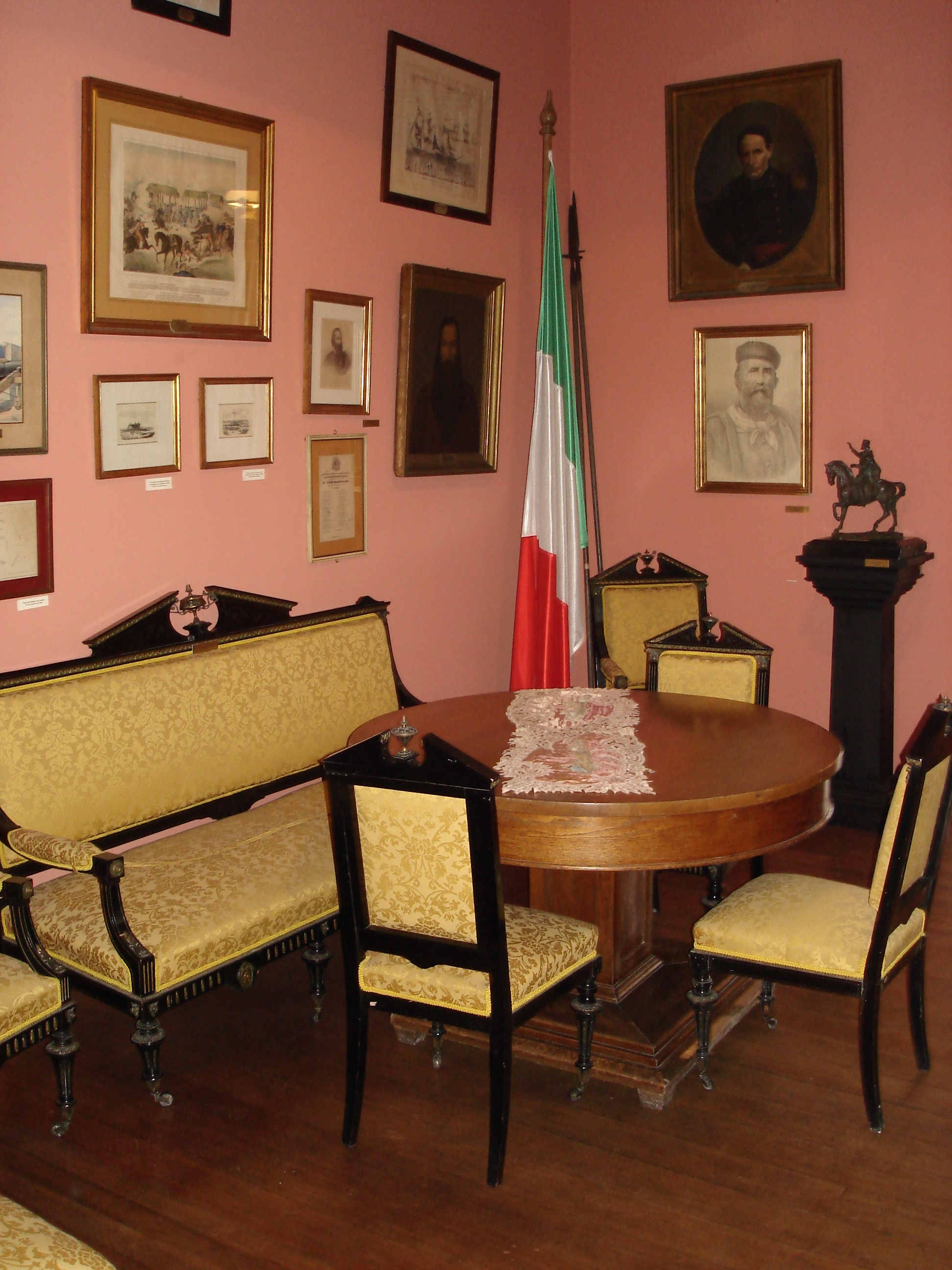 Museo Garibaldi in der Casa Garibaldi in Montevideo